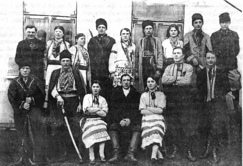 Драматичний колектив Івана Пакуша села Глещава